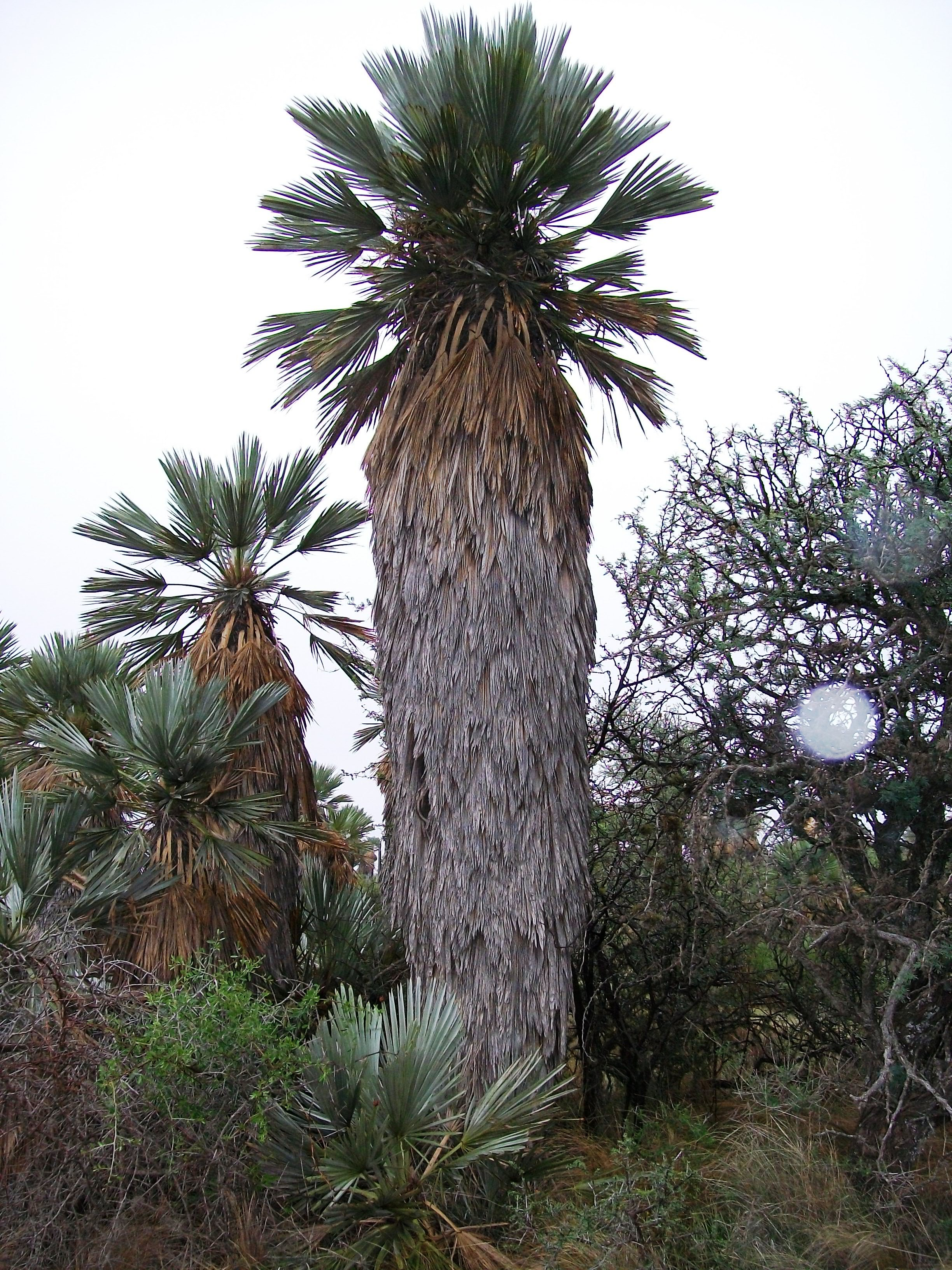 Plantas de palmas, departamento de Pocho, Traslasierra, Córdoba, Argentina